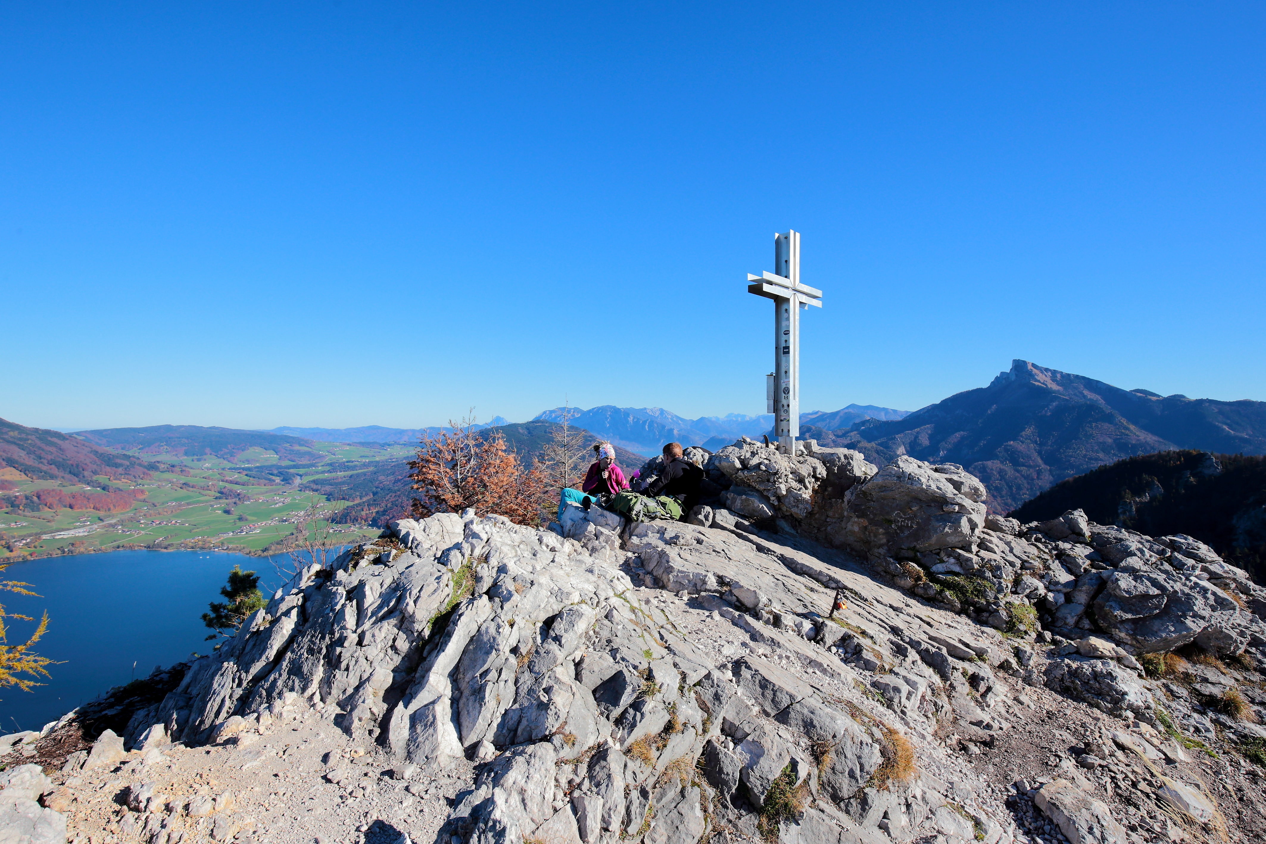 Gipfelkreuz auf dem 1060 Meter hohen Vorgipfel der 1176 Meter hohen Drachenwand in der oberösterreichischen Gemeinde St. Lorenz.Links im Bild der Mondsee. Rechts des Gipfelkreuzes der markante 1782 Meter hohe Schafberg und links davon das HöllengebirgeDieser Vorgipfel ist auch der Ausstiegspunkt des im Jahr 2008 errichteten Drachenwand-Klettersteiges, der eine Schwierigkeitsstufe von C/D hat und rund 400 Höhenmeter überwindet (inklusive Zustieg rund 560 Höhenmeter).